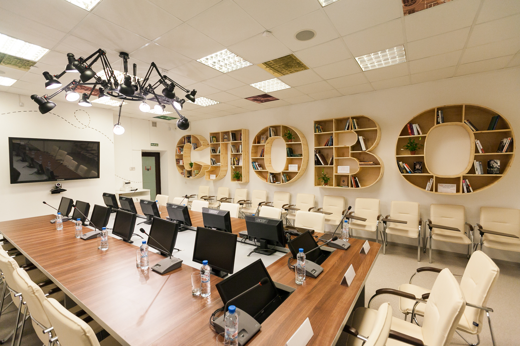 23 ноября 2013 года Центральная районная библиотека им. Н.В. Гоголя открылась после реконструкции в новом формате. Санкт-Петербург, Среднеохтинский пр., д. 8